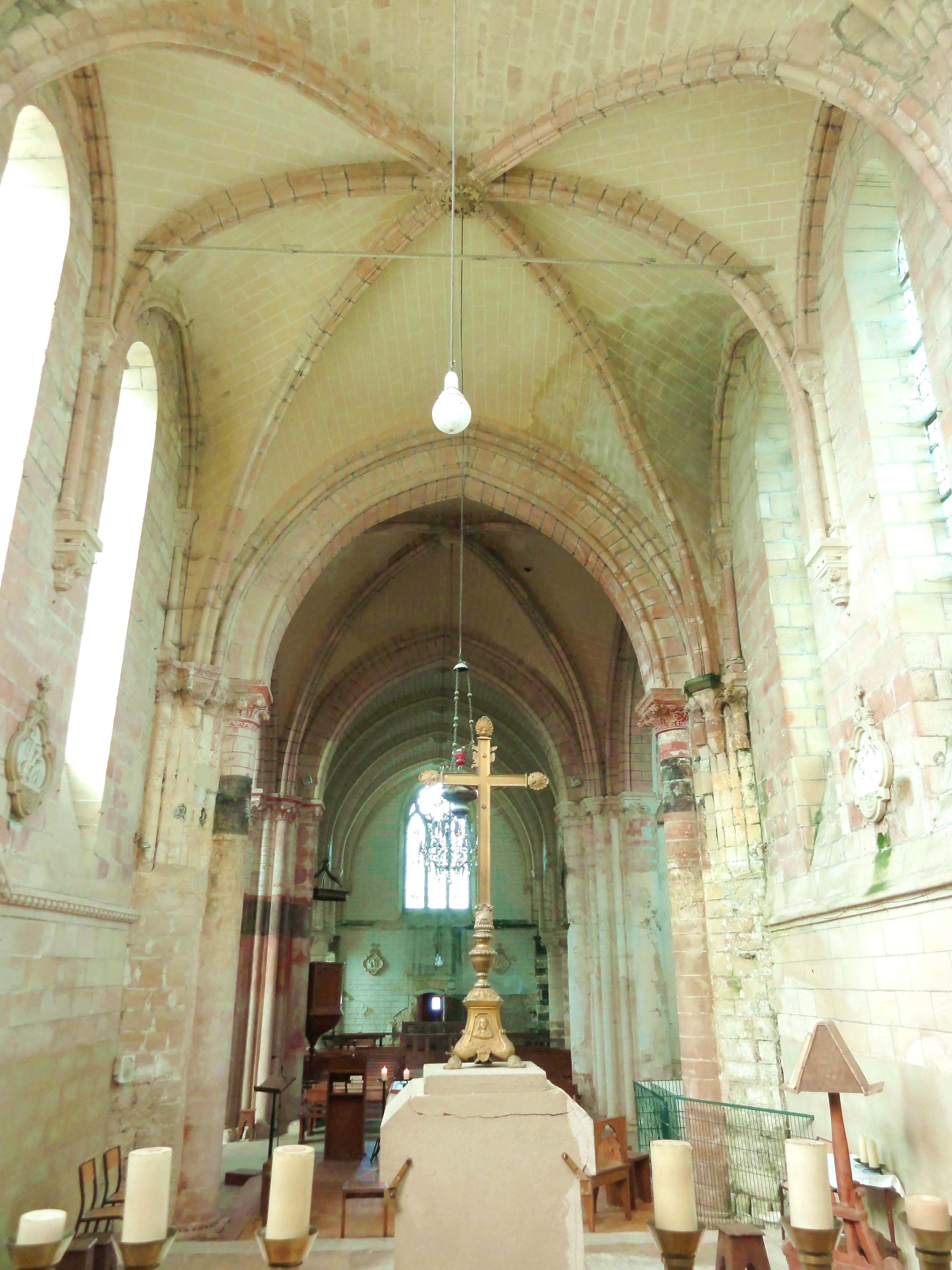 Intérieur de l'église (voir titre).